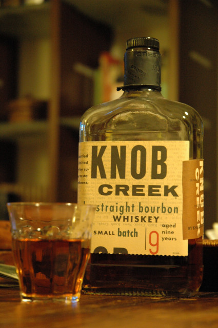 Bouteille de bourbon Knob Creek, produit par la distillerie Jim Beam.